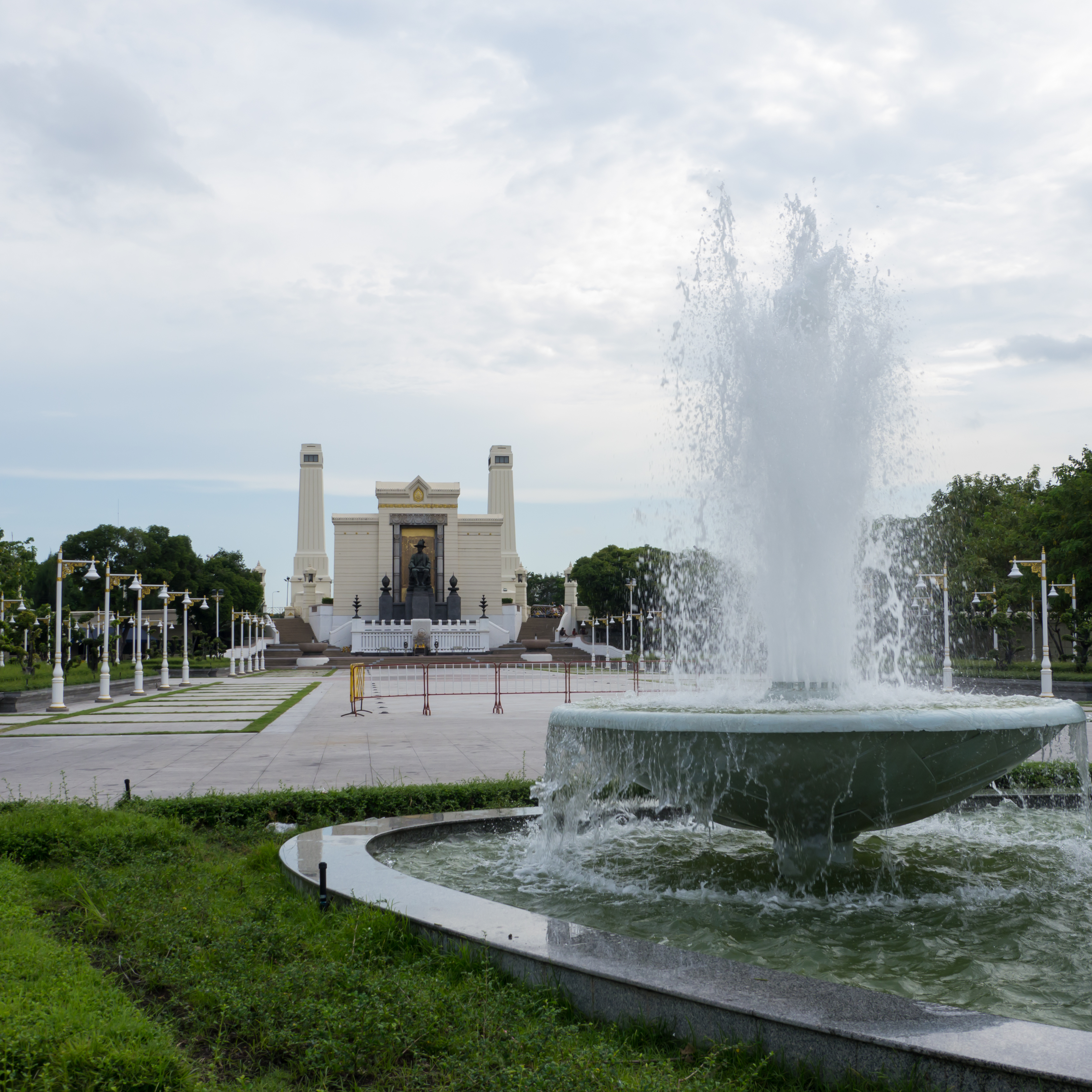 อนุสาวรีย์รัชกาลที่ 1